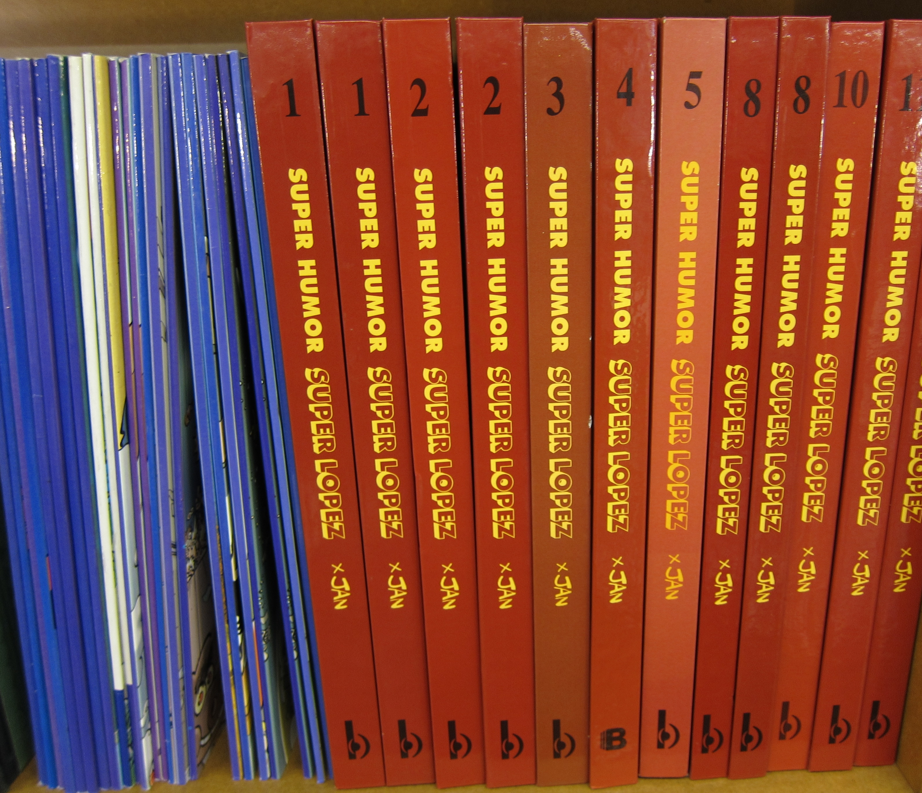 Lomos de álbumes de la serie Superlópez, en una tienda de cómics de Valencia. A la izquierda, ejemplares de la colección Fans en tapa blanda, a la derecha ediciones en tapa dura pertenecientes a la colección Super Humor.